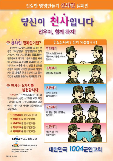 선샤인캠페인 5대 실천사항